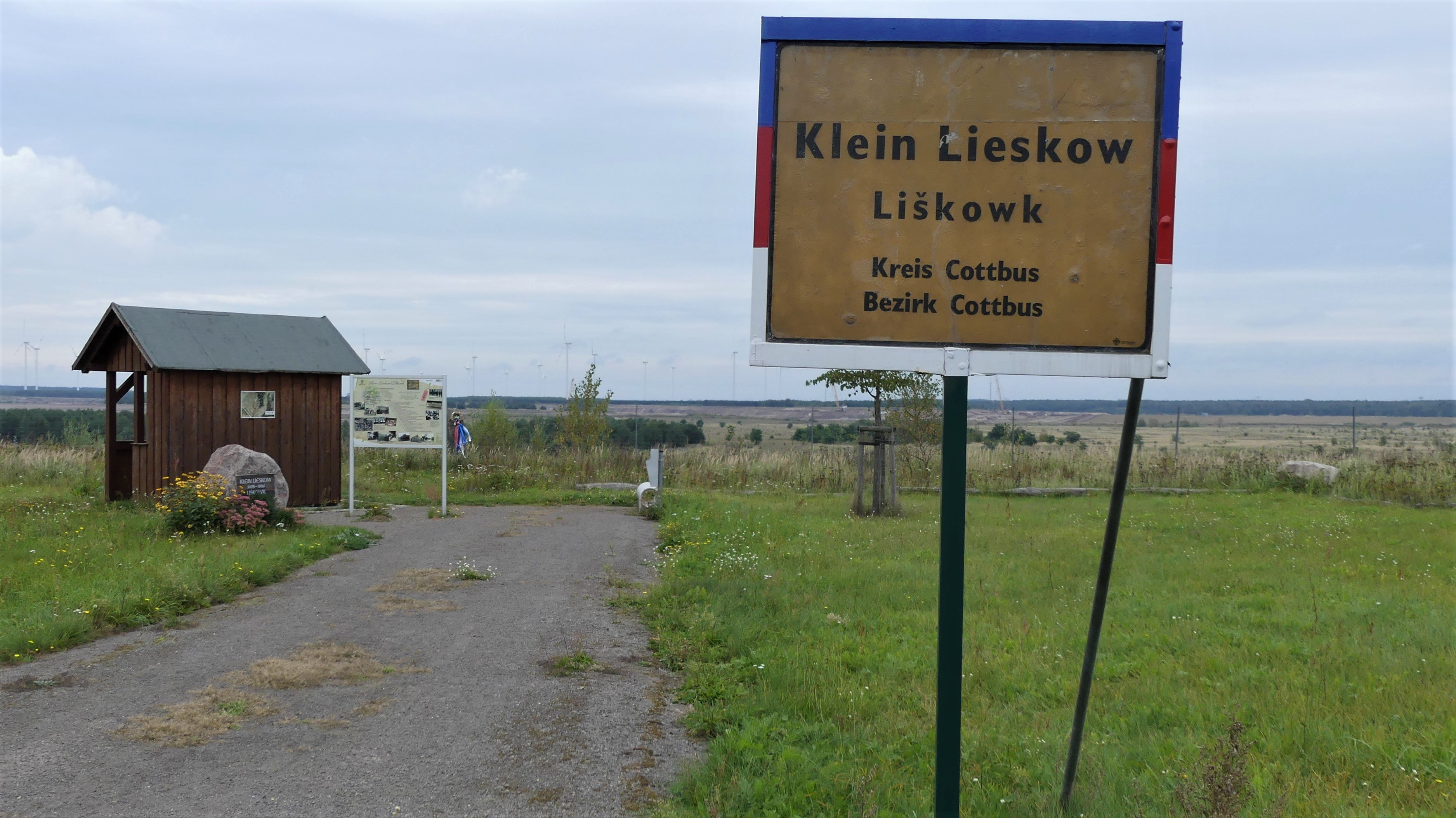 Erinnerungsstätte für des abgebaggerte Dorf Klein Lieskow im Bereich des Tagebaus Cottbus-Nord. In der Nähe des Ortsteils Schlichow der Stadt Cottbus. Hornjoserbsce: Wopomnišćo za wotbagrowanu wjesku Liškowk při brunicowej jamje Choćebuz-sewjer, blisko Šlichowa.